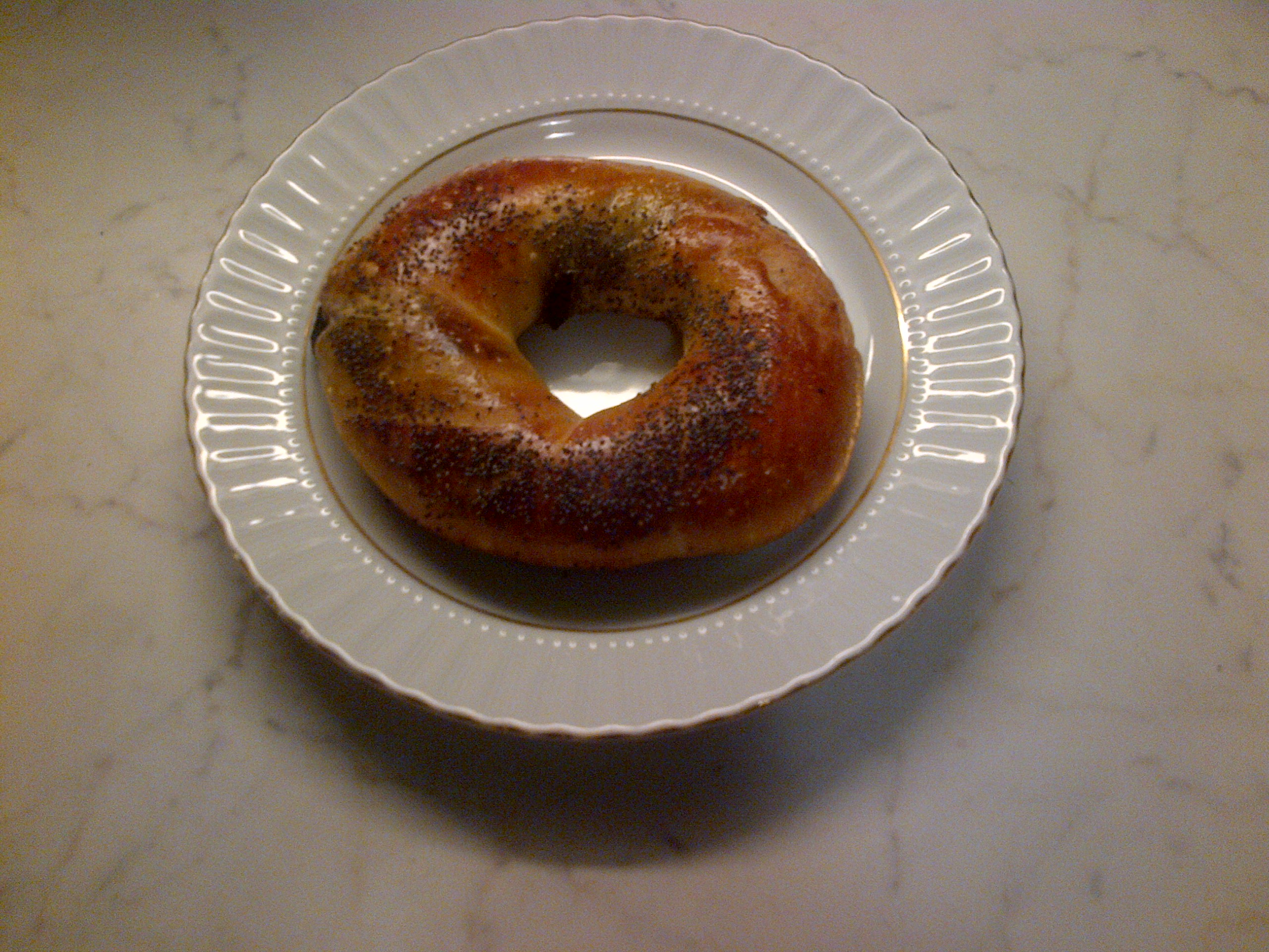 Zeytinli açma (Atxma amb olives).